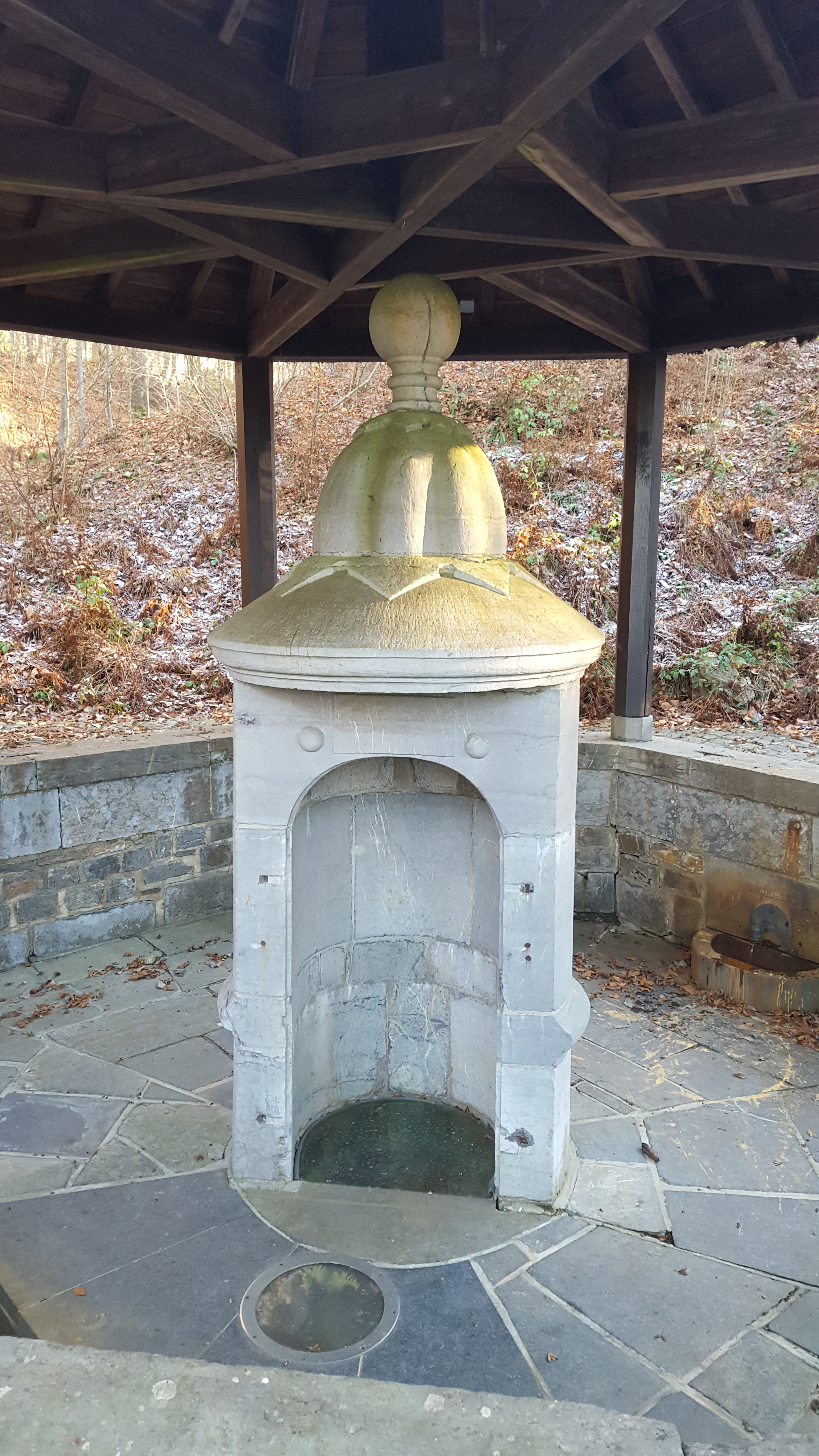 Source de la Sauvenière et Source de Groesbeek, Spa, Belgique